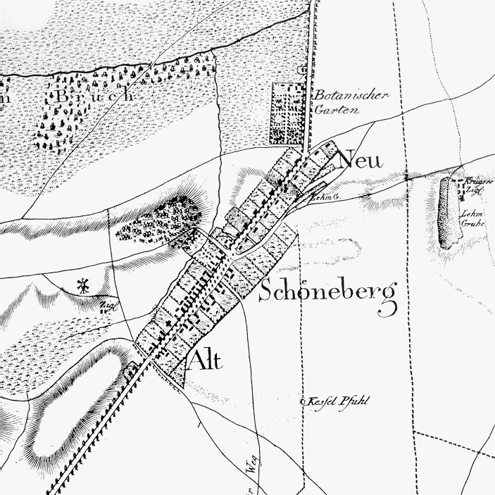 Plan von Schöneberg bei Berlin